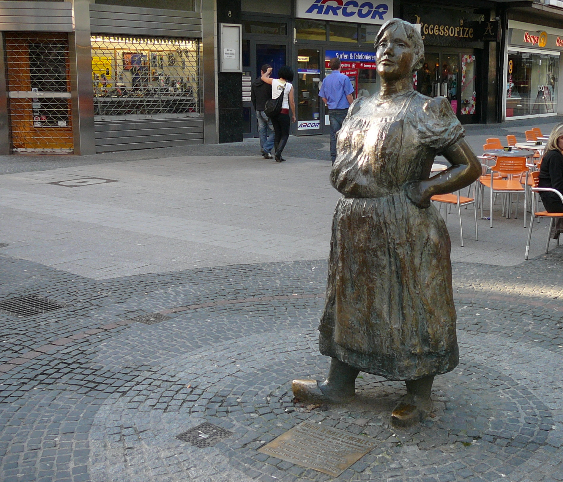 Poststraße, Wuppertal. Statue der Mina Knallenfalls, einer Romanfigur von ca. 1870 des Wuppertaler Mundartdichters Otto Hausmann.